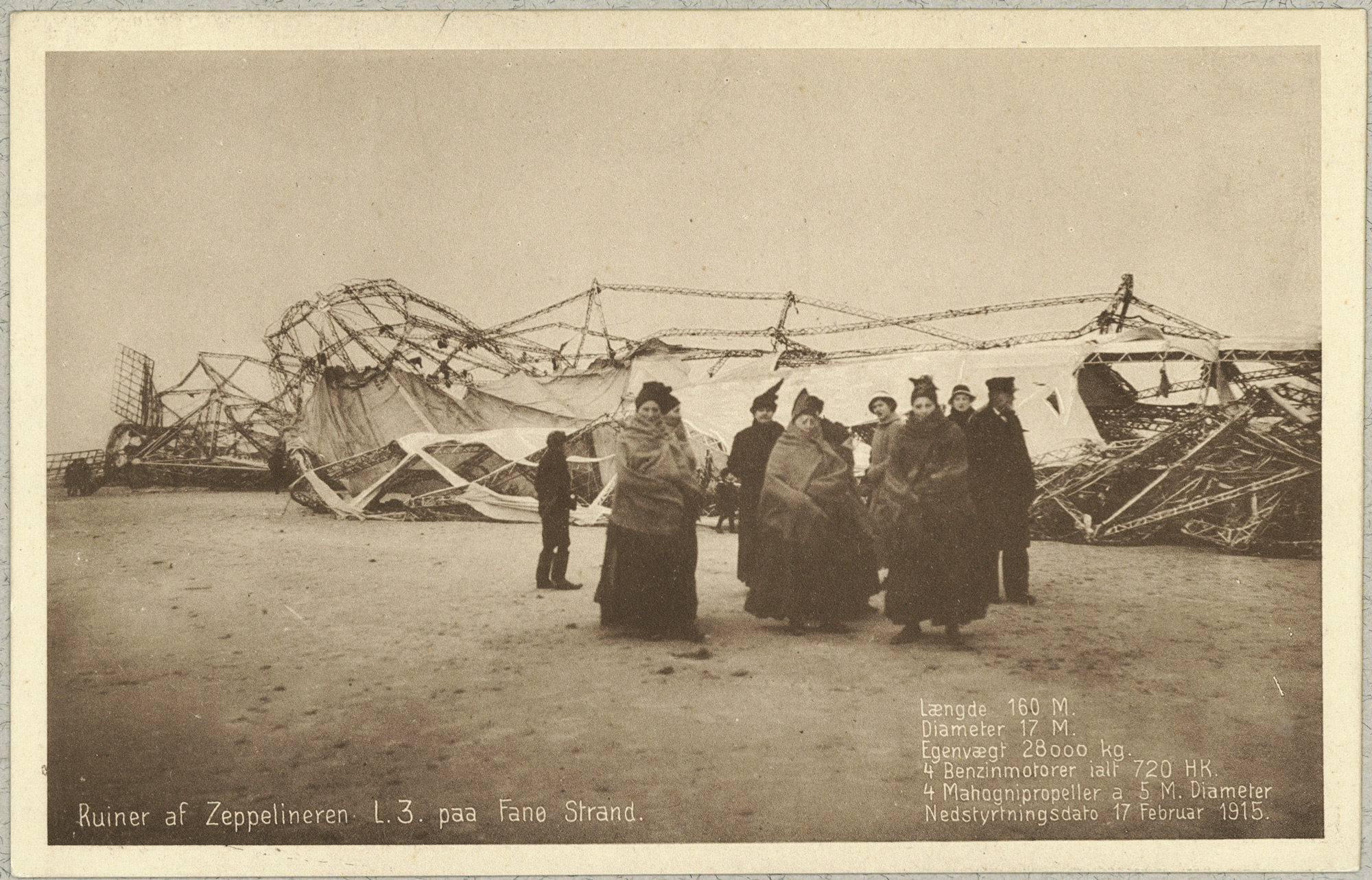 Ruiner af zeppelineren L 3 på Fanø Strand